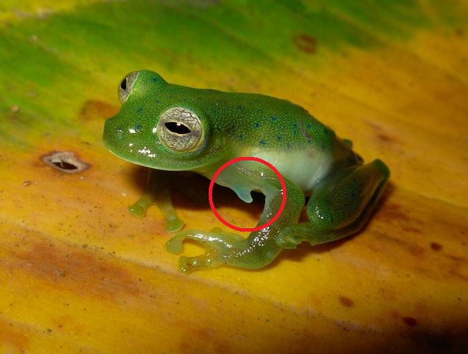 Centrolene prosoblepon, male hook